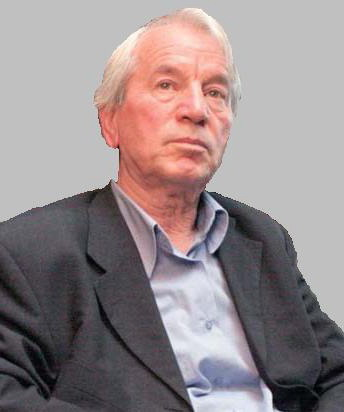 Професор Казимир Попконстантинов от ВТУ "Св. св. Кирил и Методий".